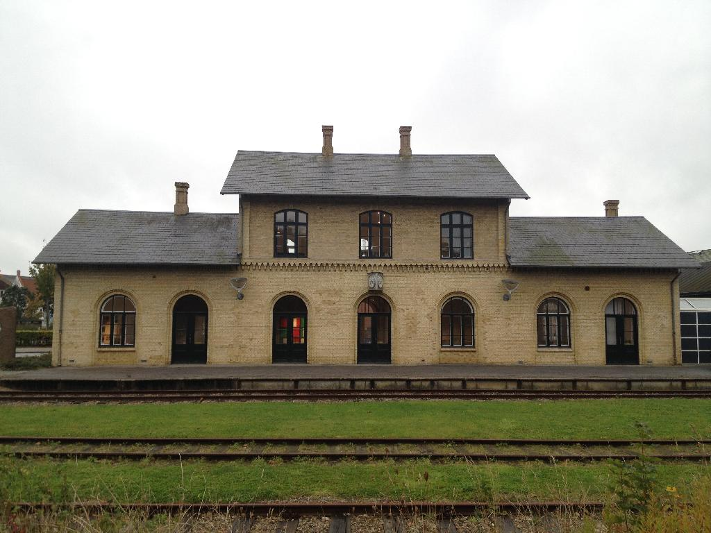 Aabenraa Banegård, Jernbanegade 2, Aabenraa, Dänemark.